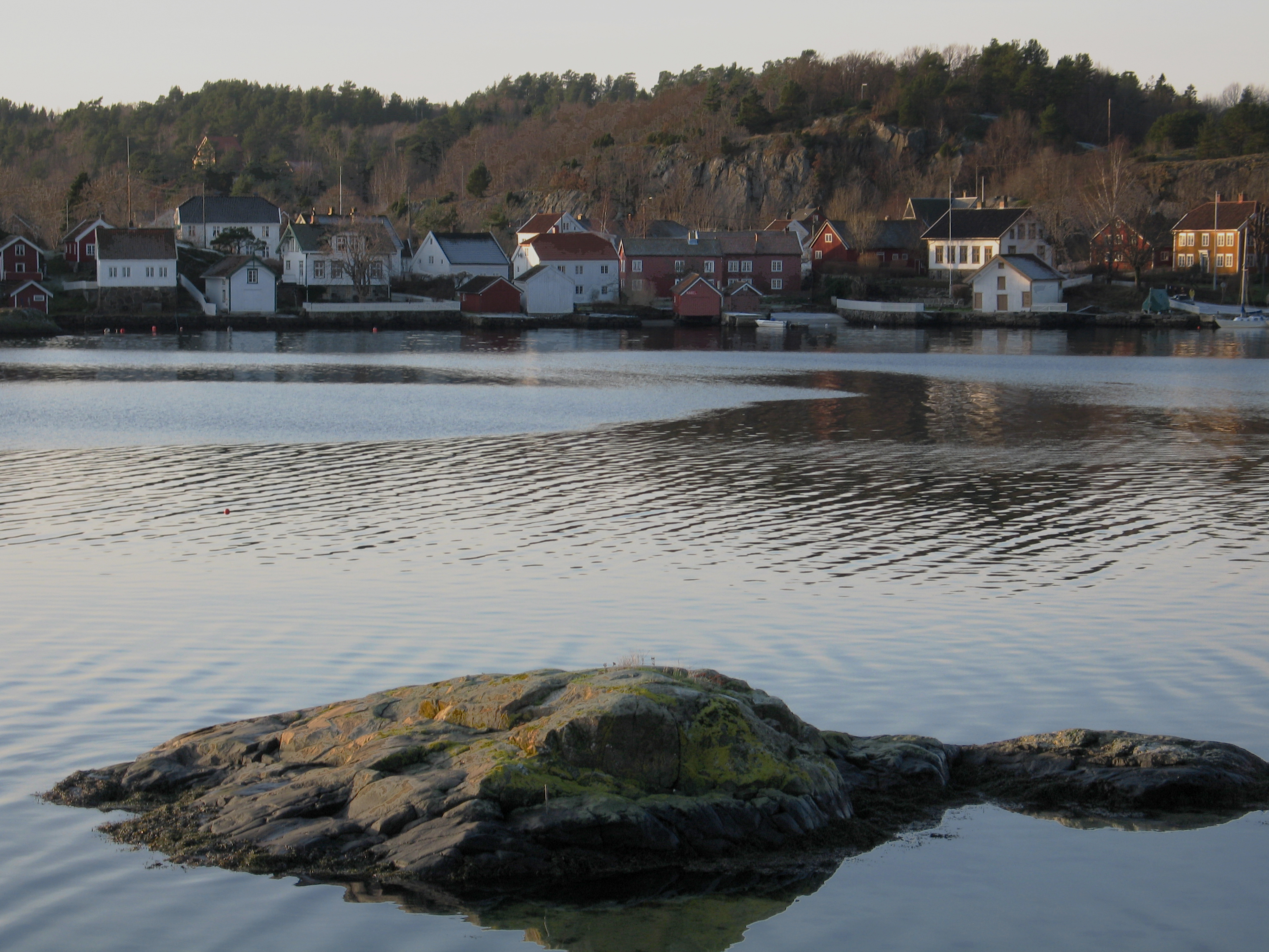 Narestø, gammel uthavn på Flosterøy i Arendal.